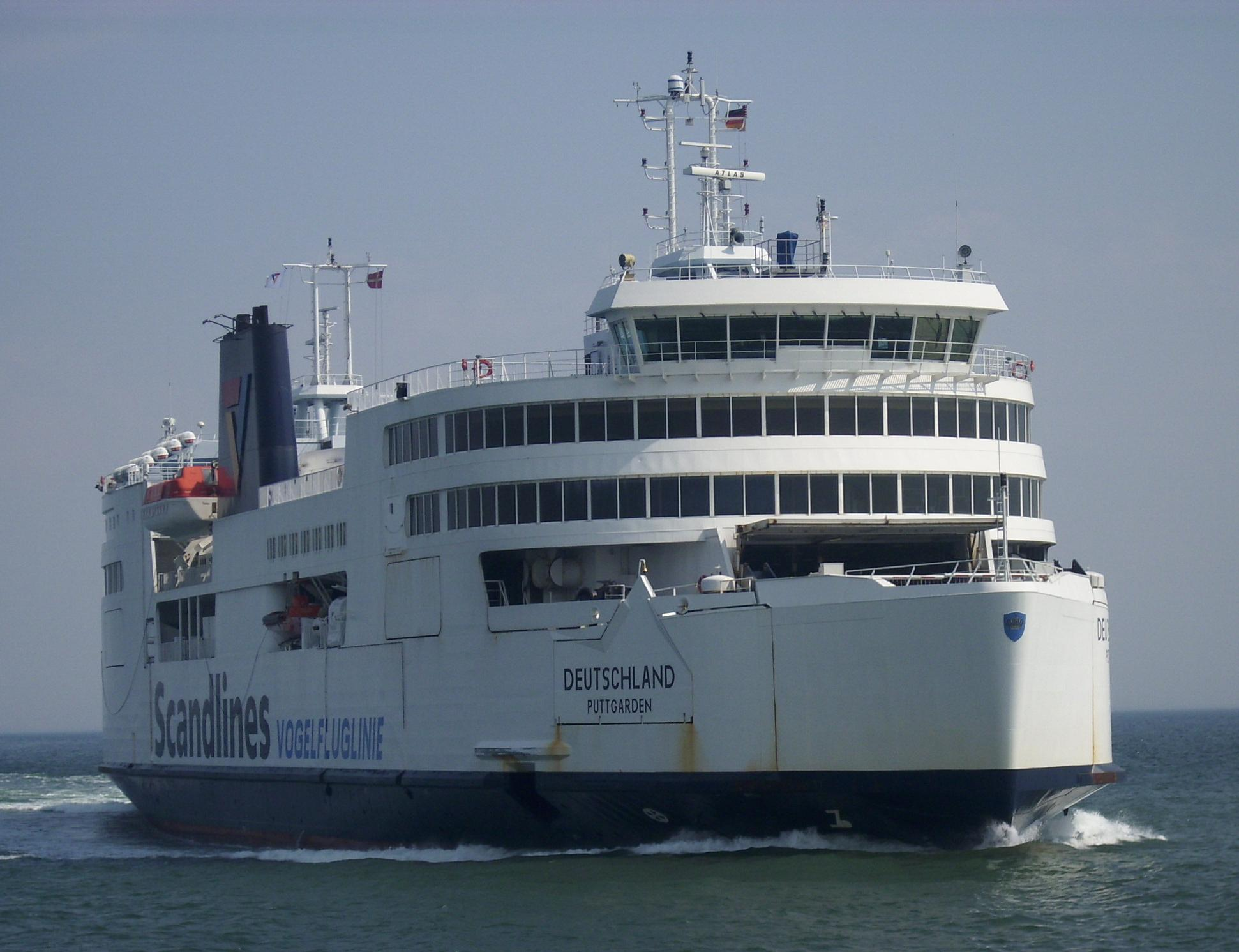 Fähre Deutschland beim Einlaufen in den Fährbahnhof Puttgarden